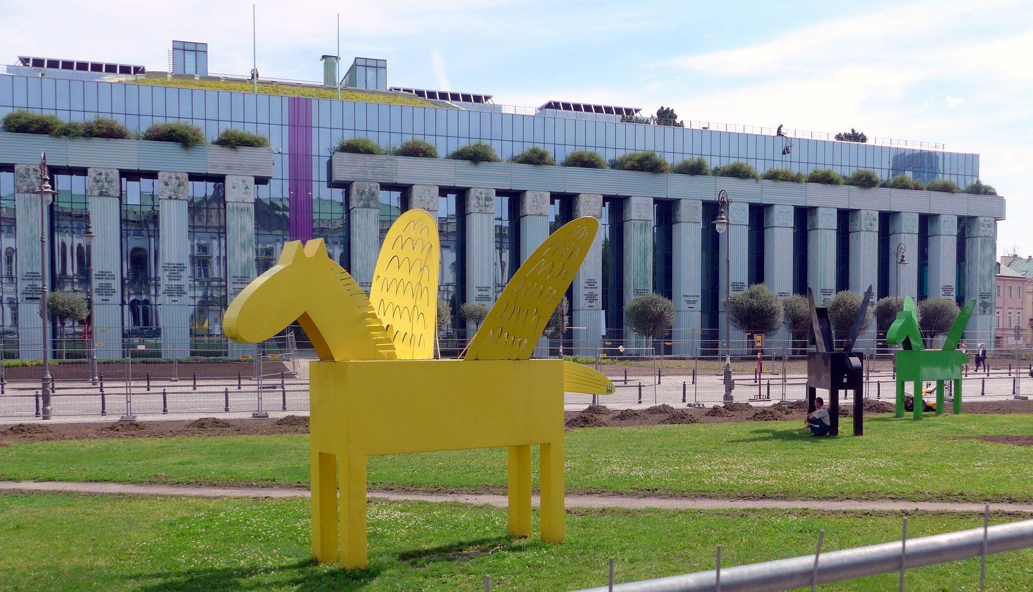 Das Oberste Gericht in Warschau, Blick vom Westen, die Pegasusskulpturen gehören zum Garten der Nationalbibliothek im Krasinskipalais gegenüber